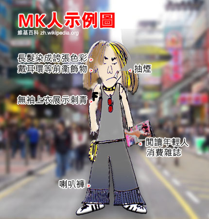 中文（香港）: MK人示例圖，tonync自行繪畫，以cc-by-2.0發布。背景圖象是旺角的西洋菜街，原圖來自英文維基百科File:BUSY.JPG，由Hamedog發布。